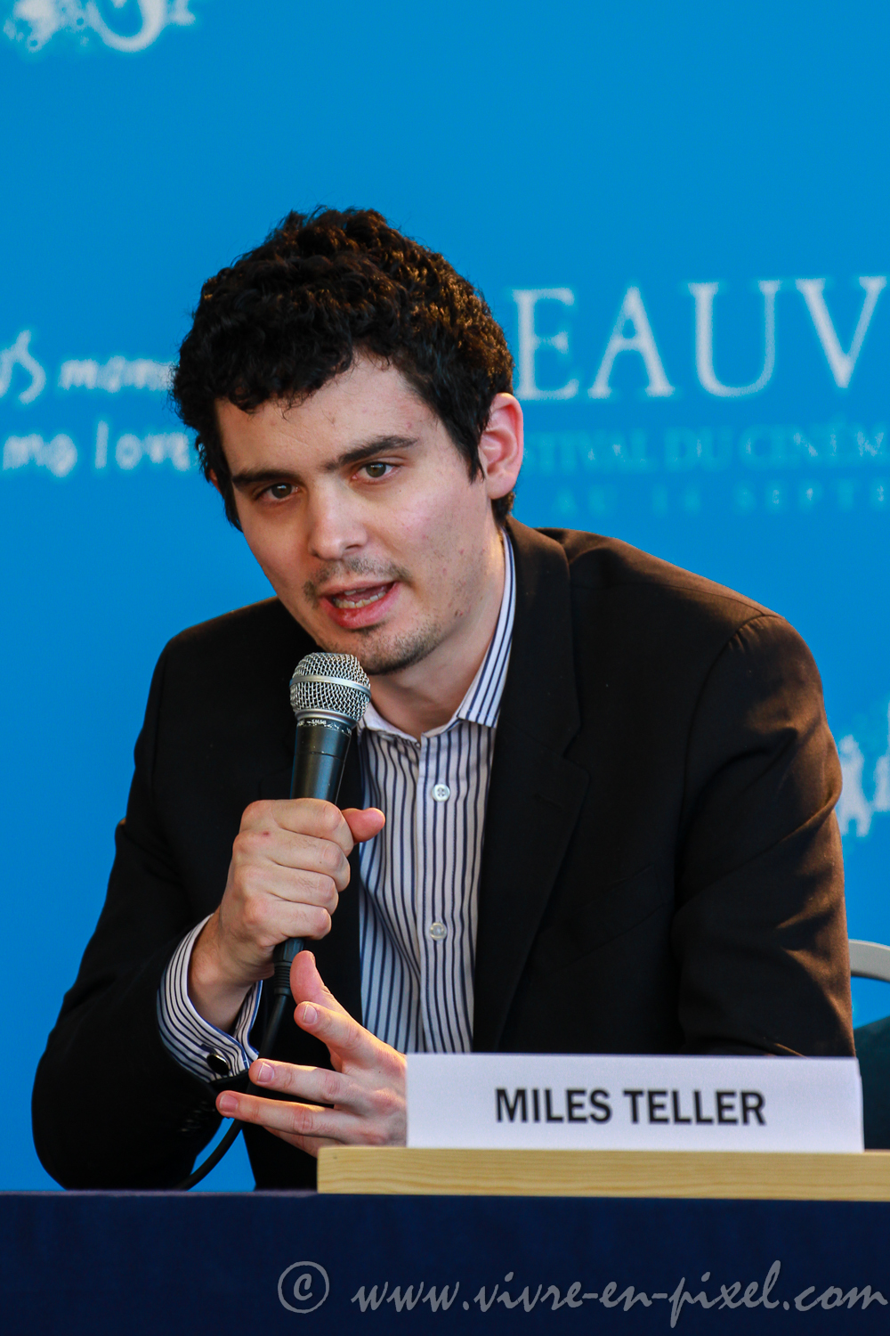 11 septembre 2014-deauville-9.jpg